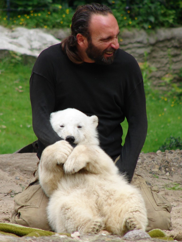 Eisbär Knut mit Pfleger Thomas Dörflein im Berliner Zoo am 31. Mai 2007